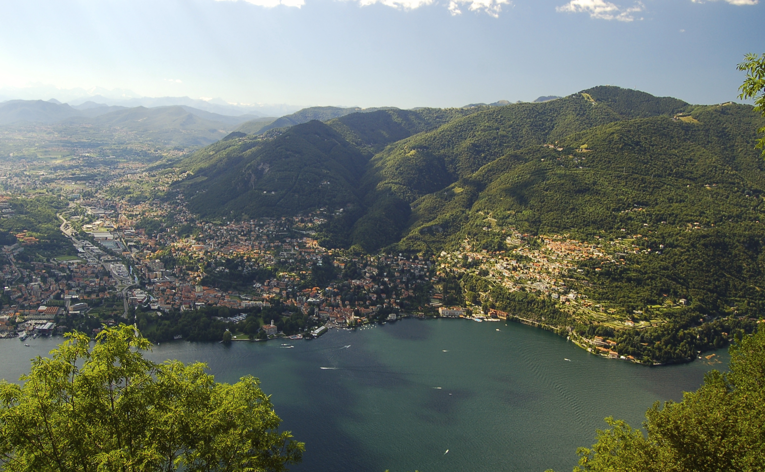 Vista di Cernobbio dal faro Voltiano di Brunate